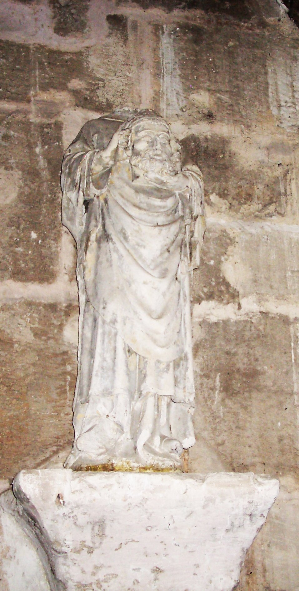 Collégiale d'Écouis - Statuaire - Saint Denis